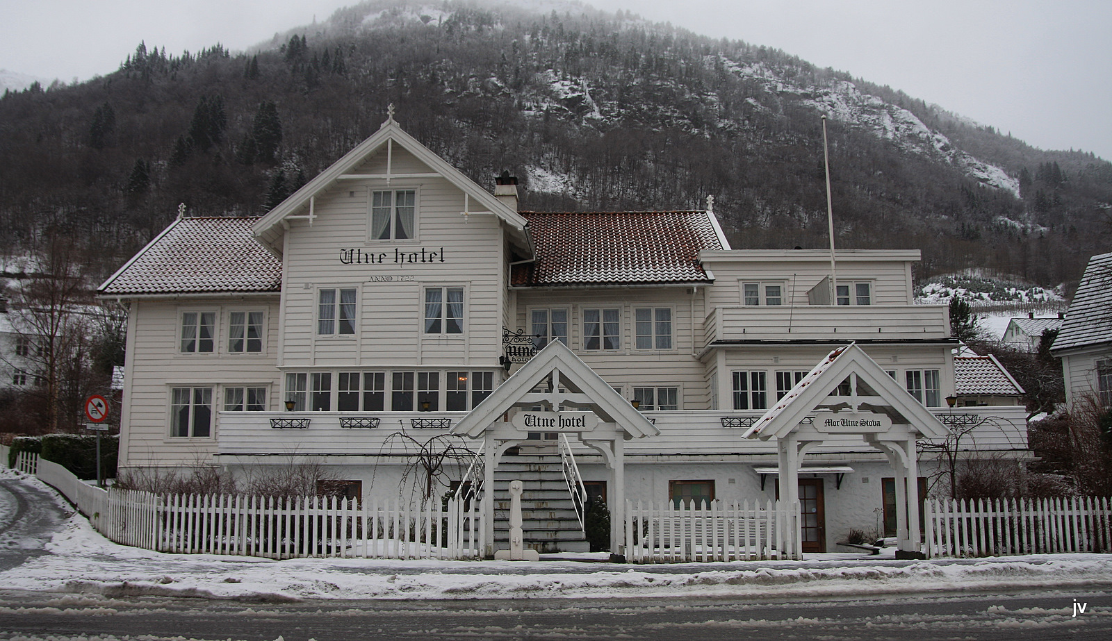 Utne Hotell